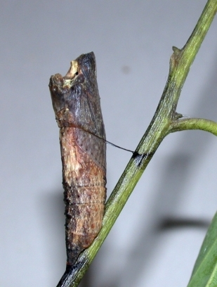 Chilasa clytia pupa, India